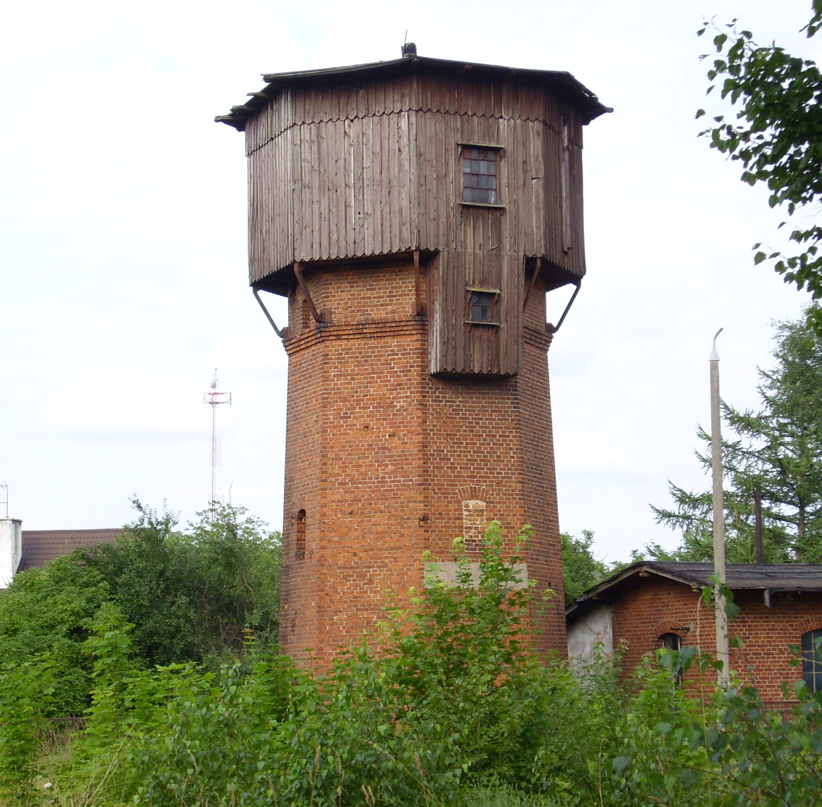 Wieża ciśnień przy stacji w Muszakach (pow. nidzicki, woj. warmińsko-mazurskie).